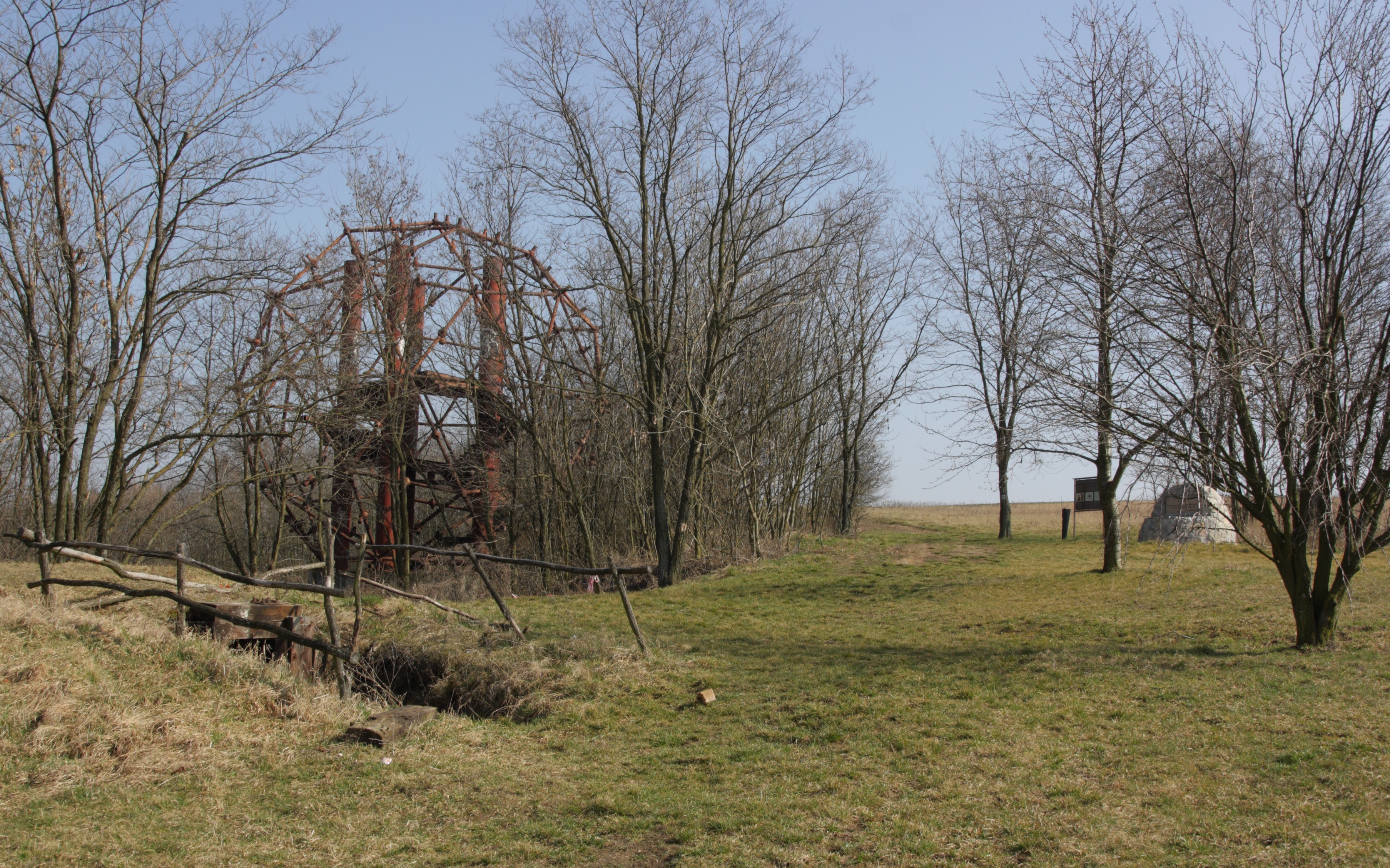 Křepice - památník Novosady.